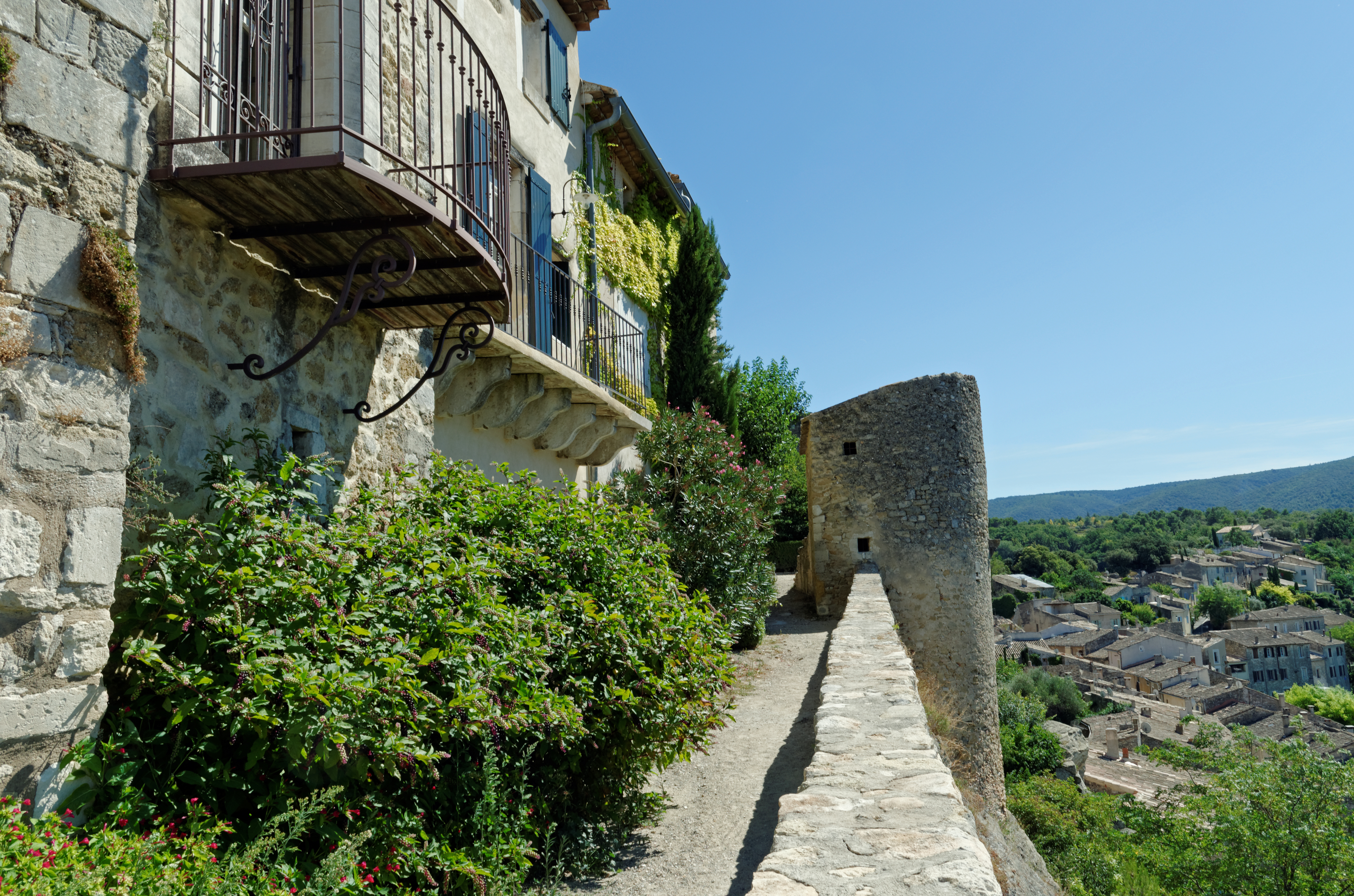 Vue des remparts de Ménerbes